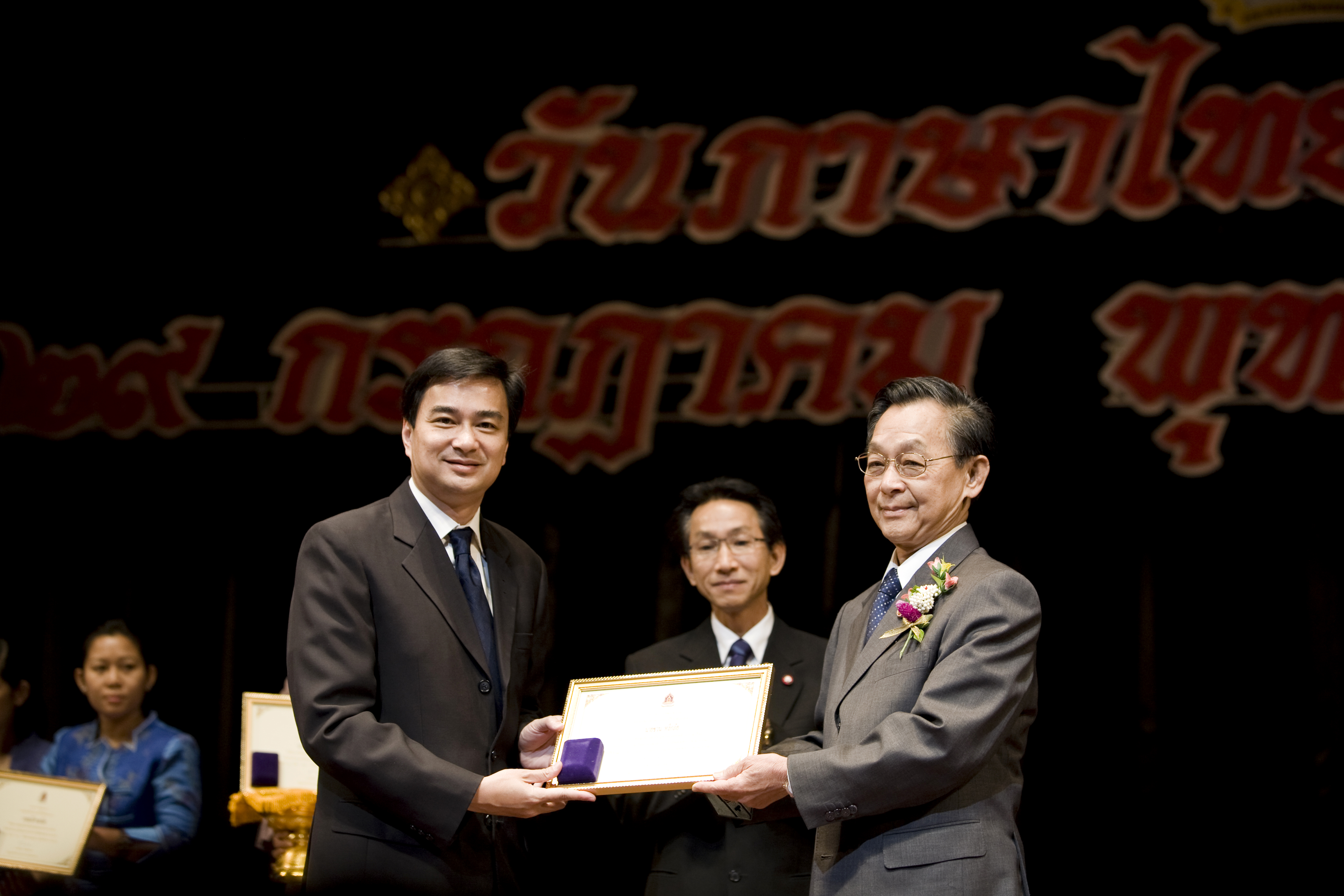 คุณชวน หลีกภัย, นรม.เป็นประธานในพิธีมอบรางวัลงานวันภาษาไทยแห่งชาติ ประจำปี2552 ณ หอประชุมใหญ่ ศูนย์วัฒนธรรมแห่งประเทศไทย 29กรกฎาคม2552 (The Official Site of The Prime Minister of Thailand Photo by พีรพัฒน์ วิมลรังครัตน์)